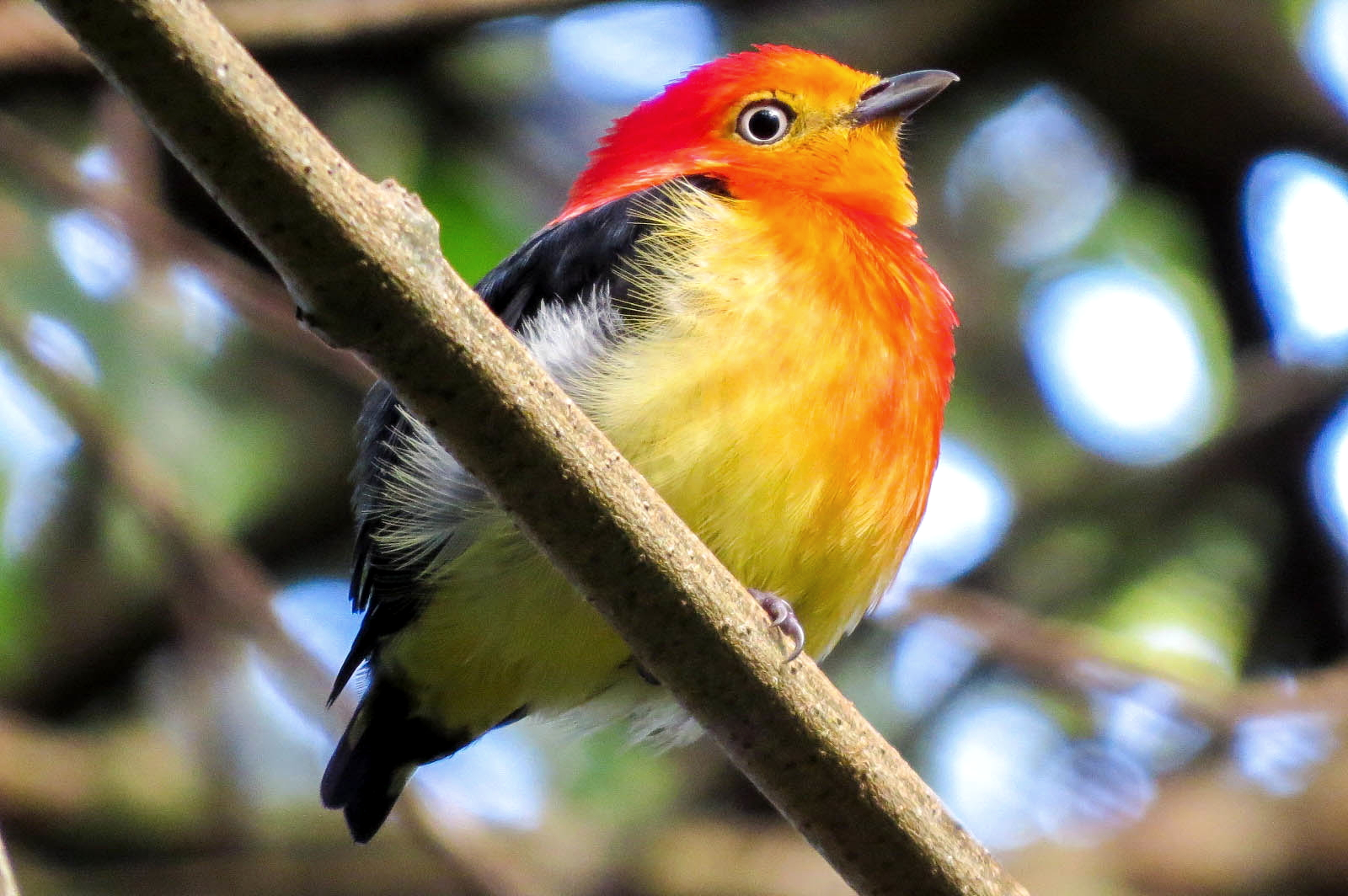 Uirapuro Laranja ( Pipra fasciicauda), macho